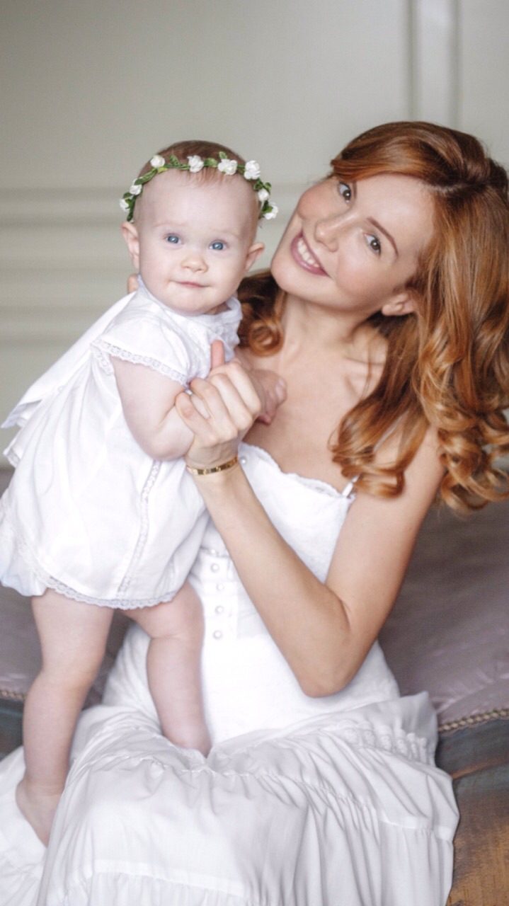 Татьяна Абраменко с дочерью